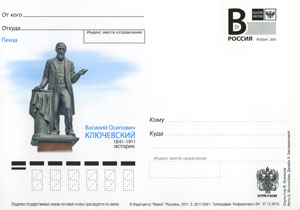 Почтовая карточка № 1о-2011/2011-024/1. Василий Осипович Ключевский (1841-1911), историк. Пенза (с изображением памятника В. О. Ключевскому работы скульптора В. Ю. Кузнецова)